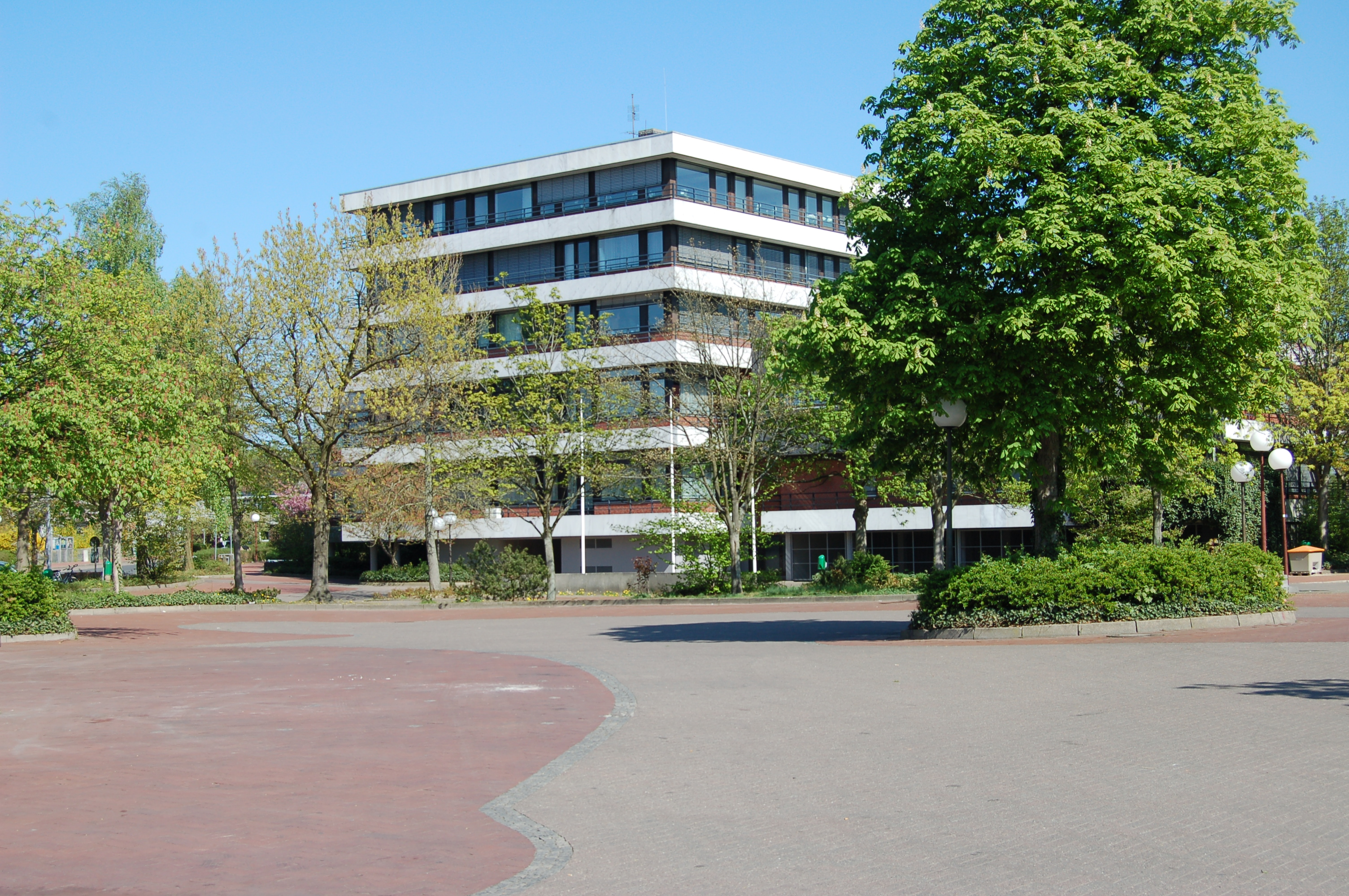 Der Marktplatz von Uetersen, im Hintergrund das Uetersener Rathaus